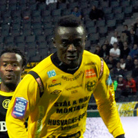 Gbenga Arokoyo